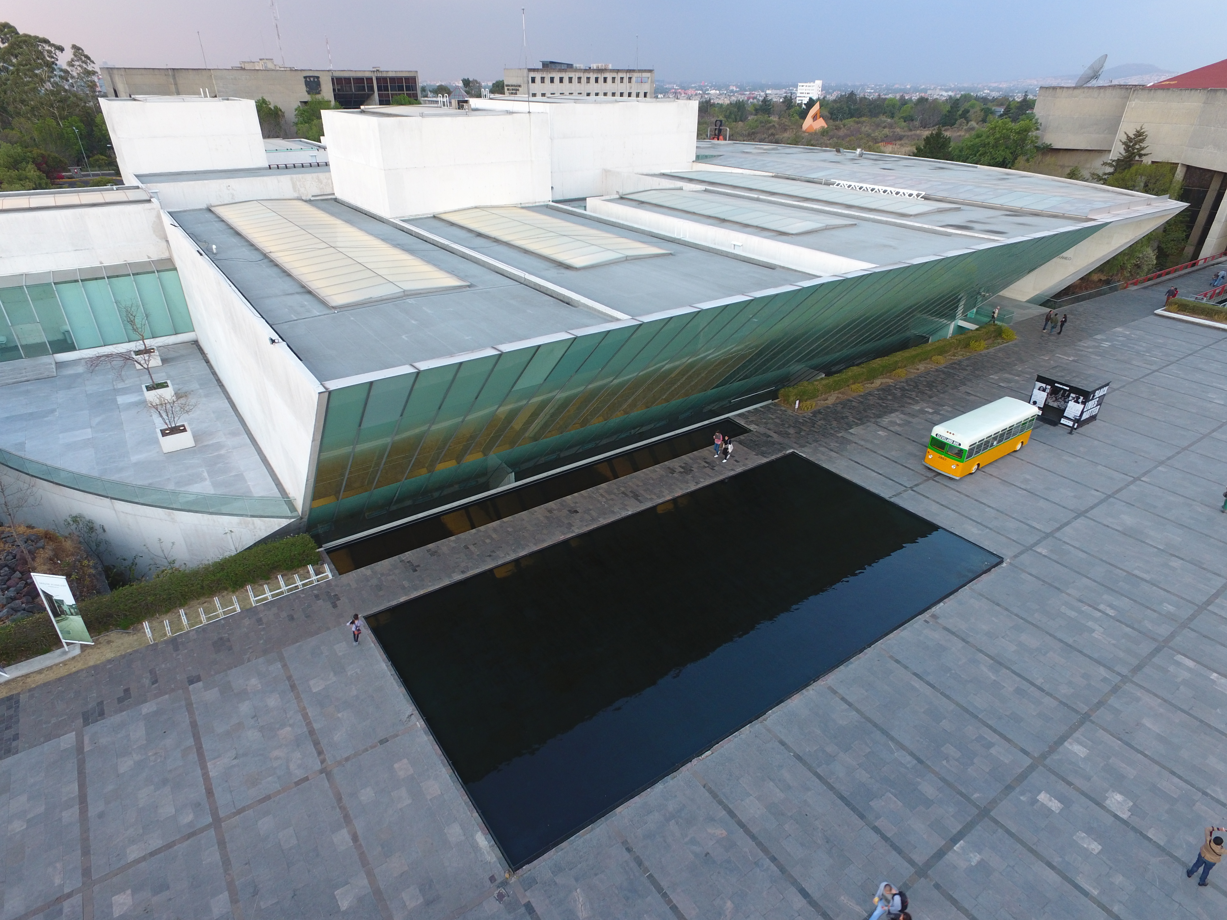 Foto con dron del MUAC en Ciudad Universitaria, UNAM, México